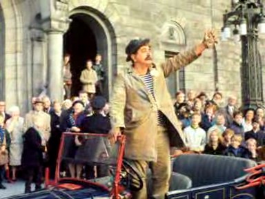 Tom Manders als Dorus.